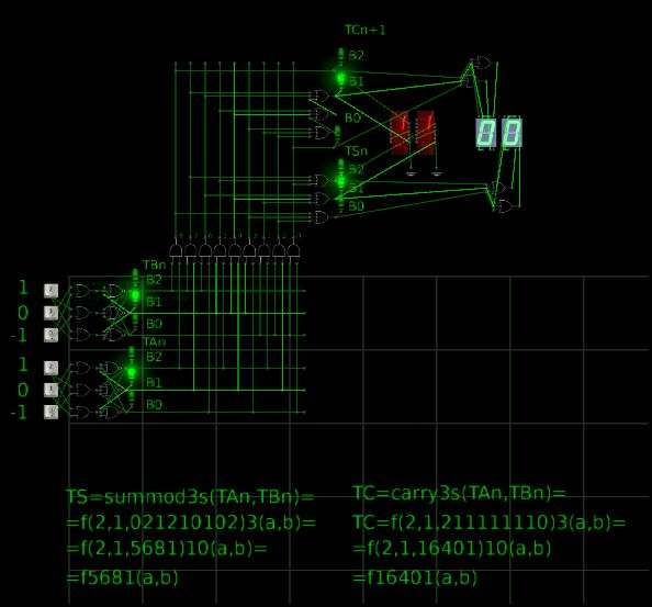 Снимок модели одноразрядного троичного симметричного полусумматора в трёхбитной системе логических элементов в логическом симуляторе Atanua.